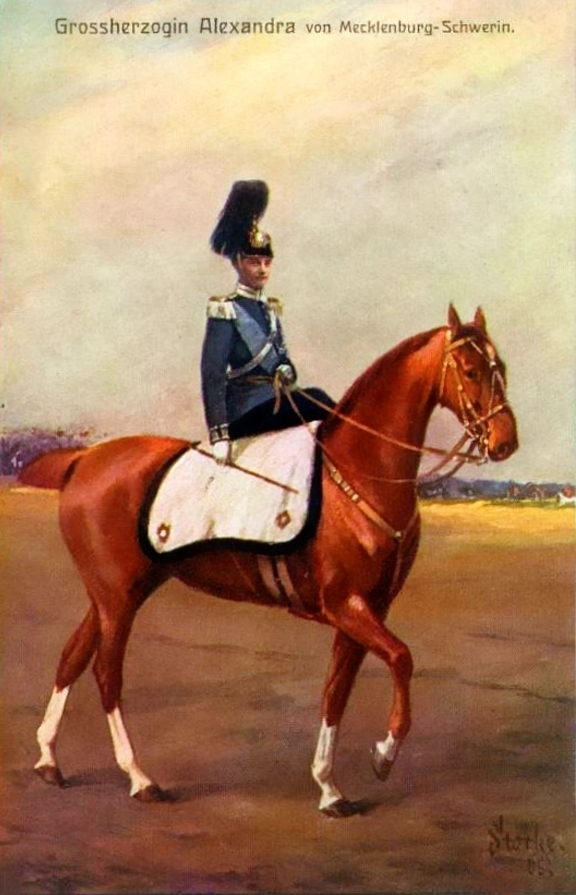 Regimentschefin des 2. Großherzoglich Mecklenburgischen Dragoner-Regiments Nr. 18 Großherzogin Alexandra zu Mecklenburg-Schwerin